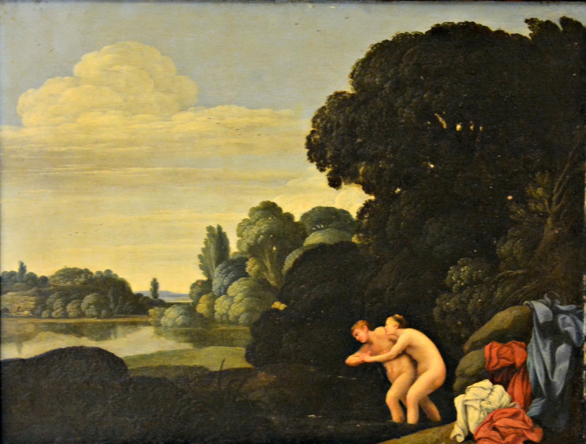 Vedi titolo